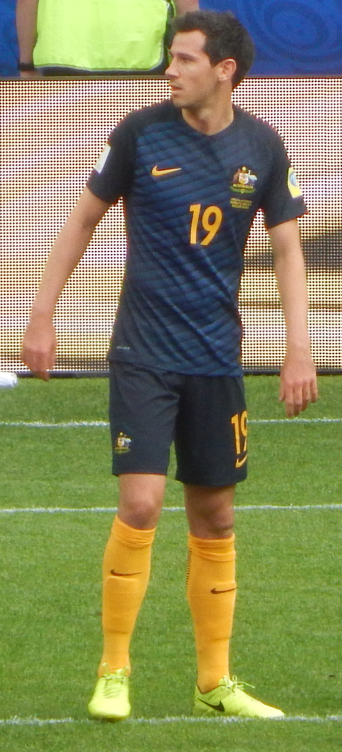 Райан Макгован Матч Чили – Австралия